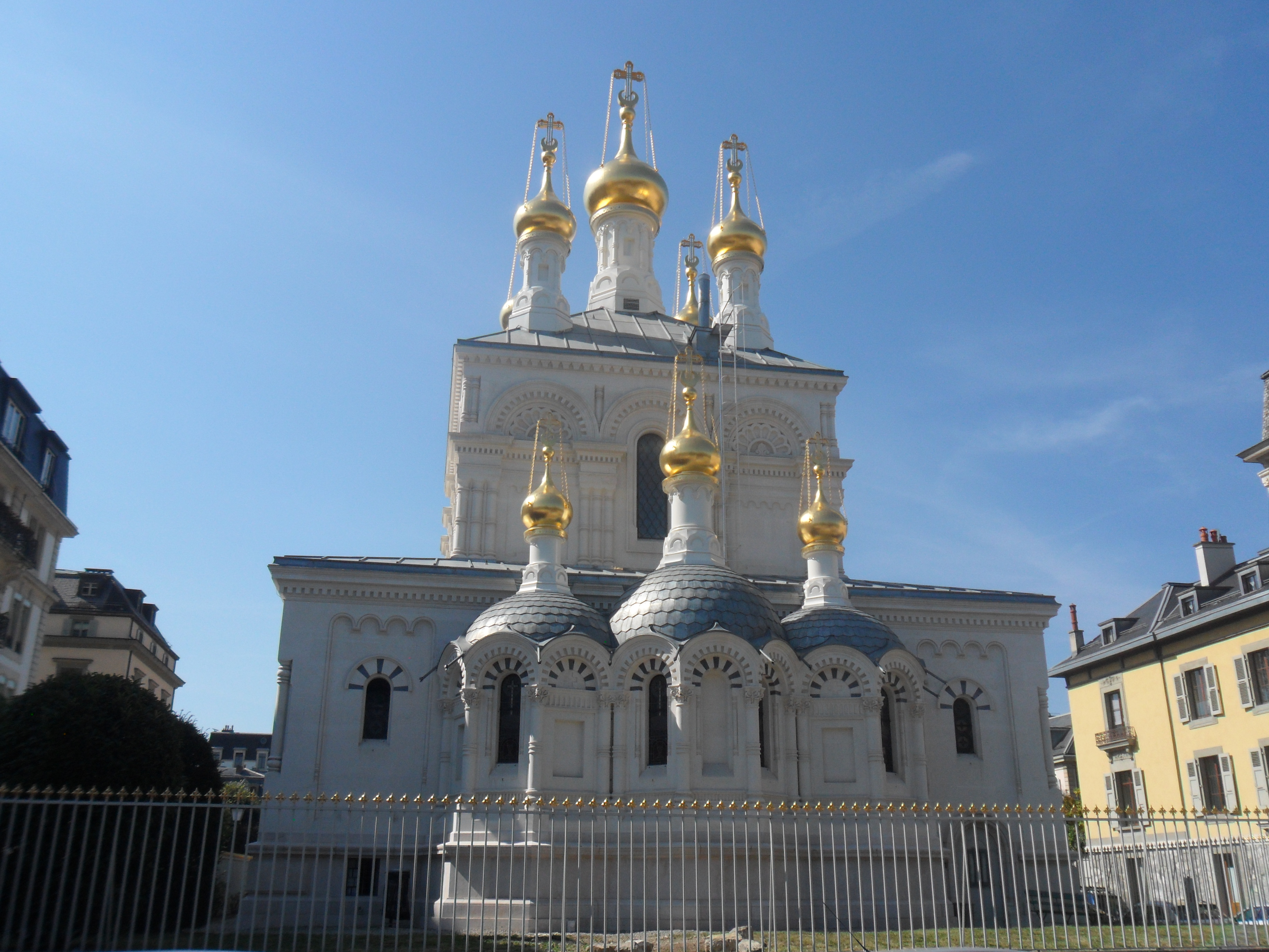 Façade de l'Église russe de Genève